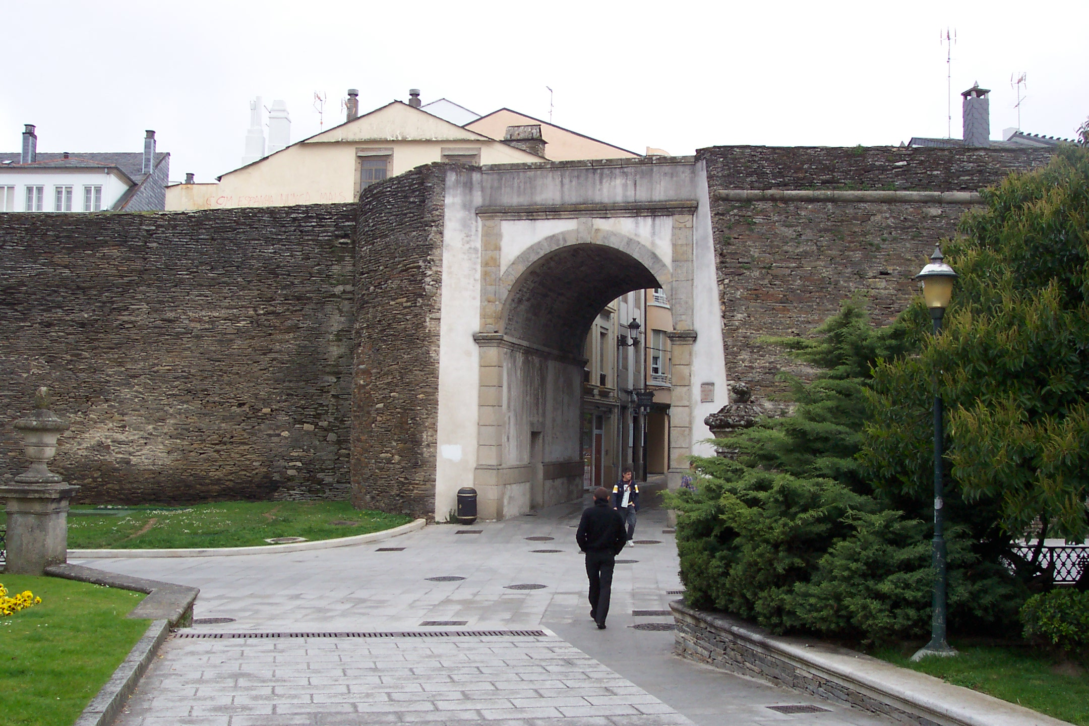 Porta do Bispo Izquierdo, Tamén chamada Porta do Cárcere. Aberta en 1888.